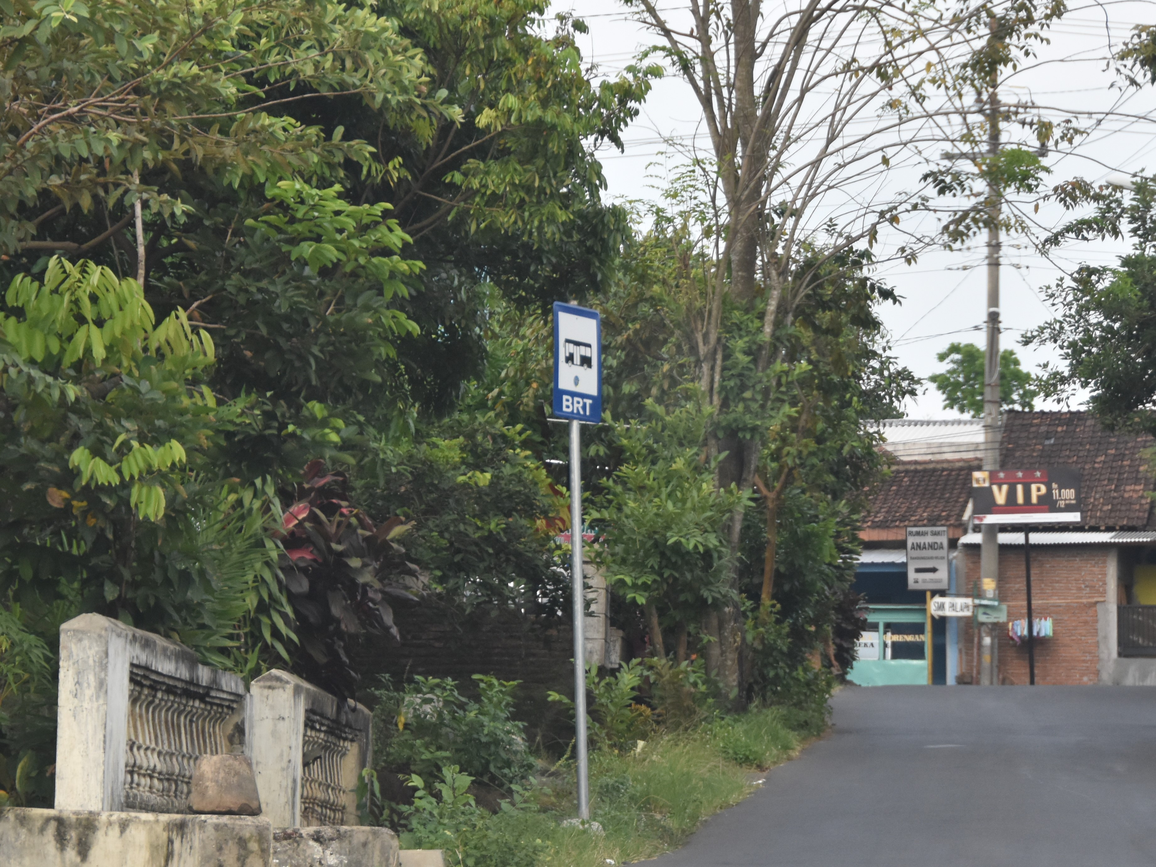 Feeder 4 arah GTP